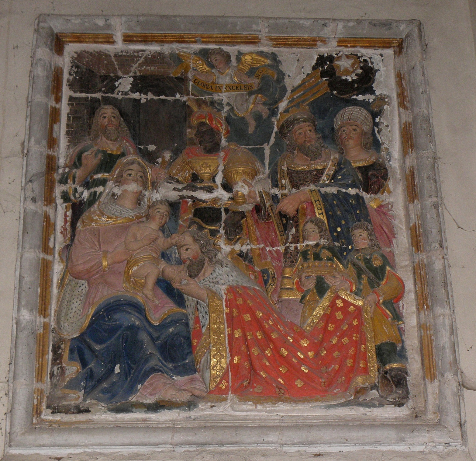 Église Saint-Georges de Martigné-sur-Mayenne (53). Bas relief de l'Adoration des Mages.